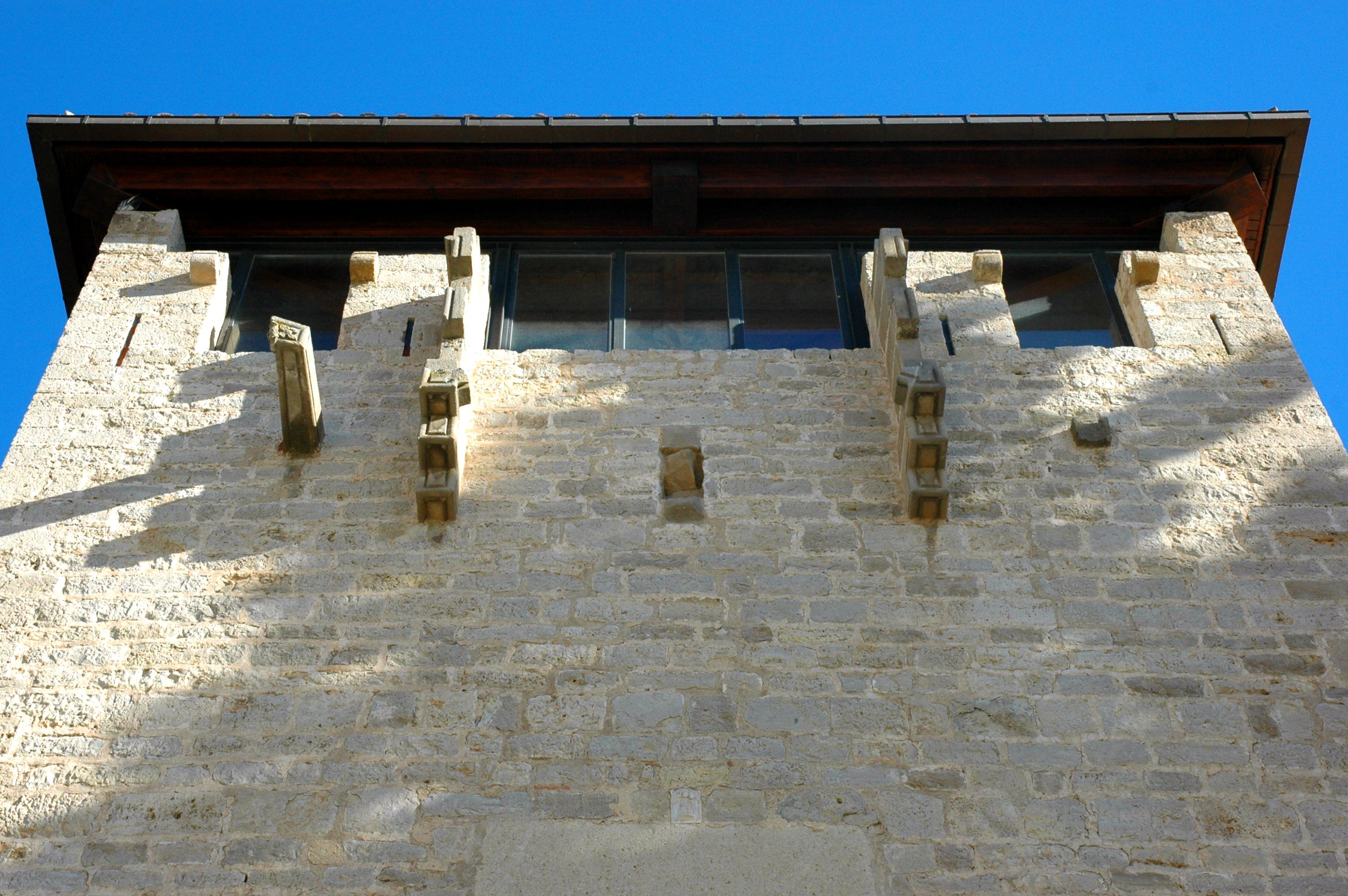 Monestir de Sant Cugat - Palau abacial detall elements defensius a la torre d'entrada, amb els suports del matacà i els merlets convertits en finestres